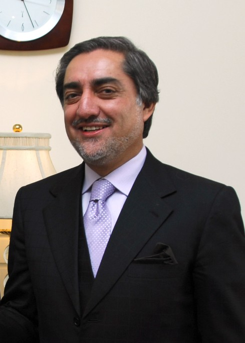 Abdullah Abdullah in Kabul, Afghanistan.